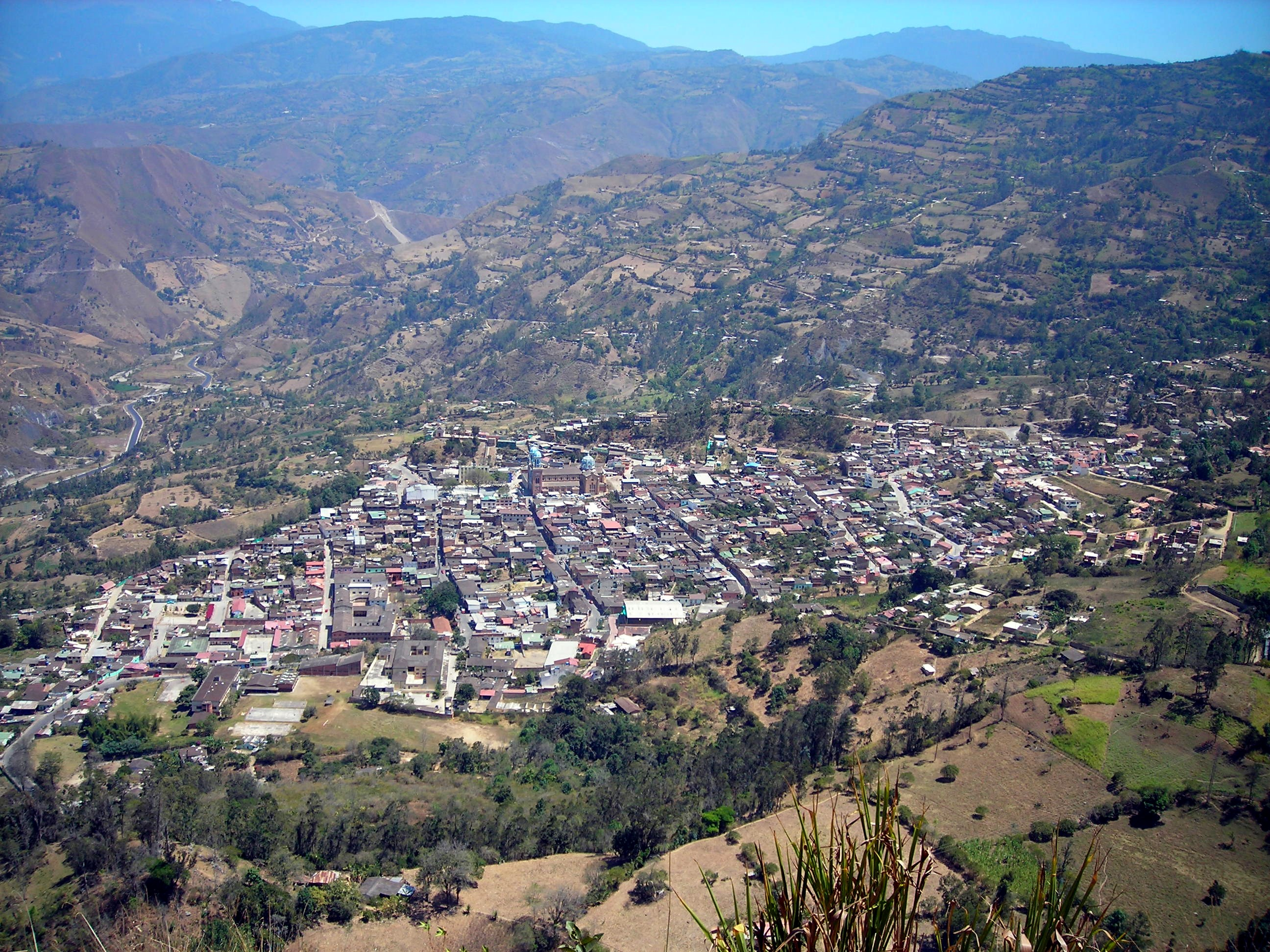 Panorámica de Cáqueza-Cundinamarca-Colombia, desde el alto de Monruta